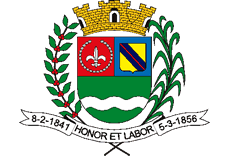 Brasão_do_Municipio_de_Santa_Branca-SP